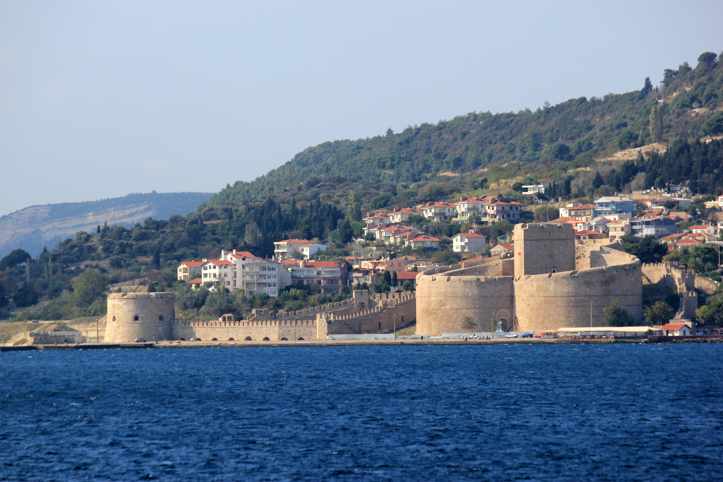 Die Festung Kilitbahir bei Eceabat am Westufer der Dardanellen.